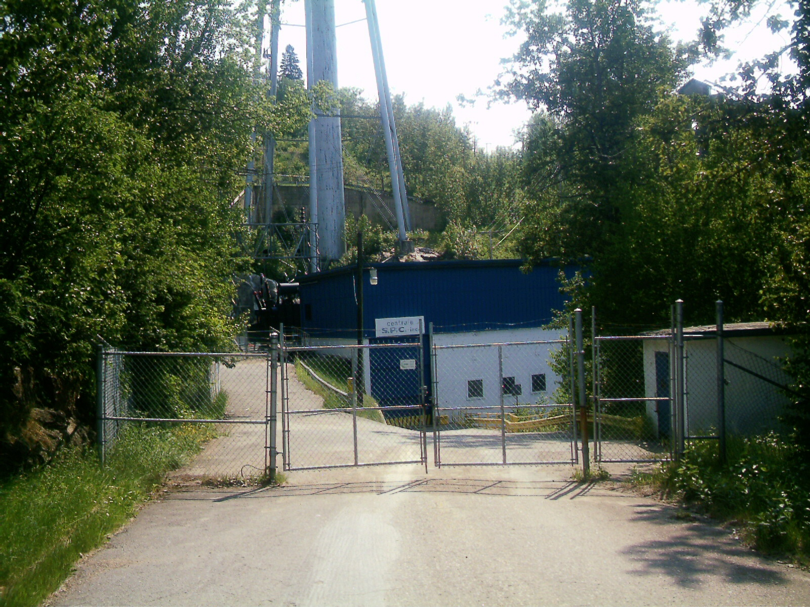 Centrale d'Elkem Métal à Chicoutimi